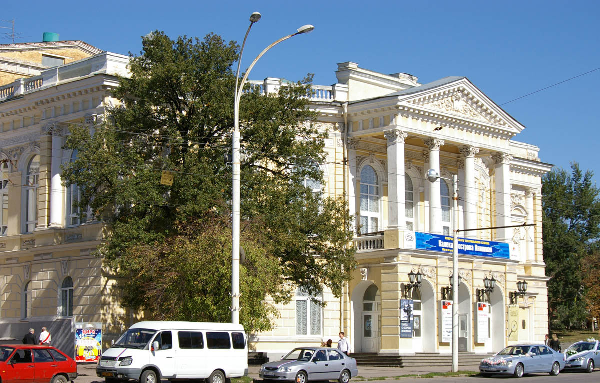 Молодёжный театр (бывший ТЮЗ)